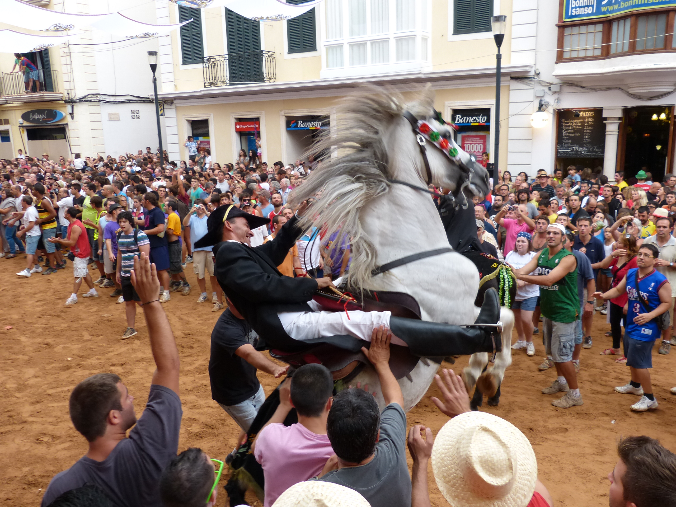 Fiestas de Gracia en Mahon This is a photography of a Folklore festival in Spain (Wikidata id Q13258770).